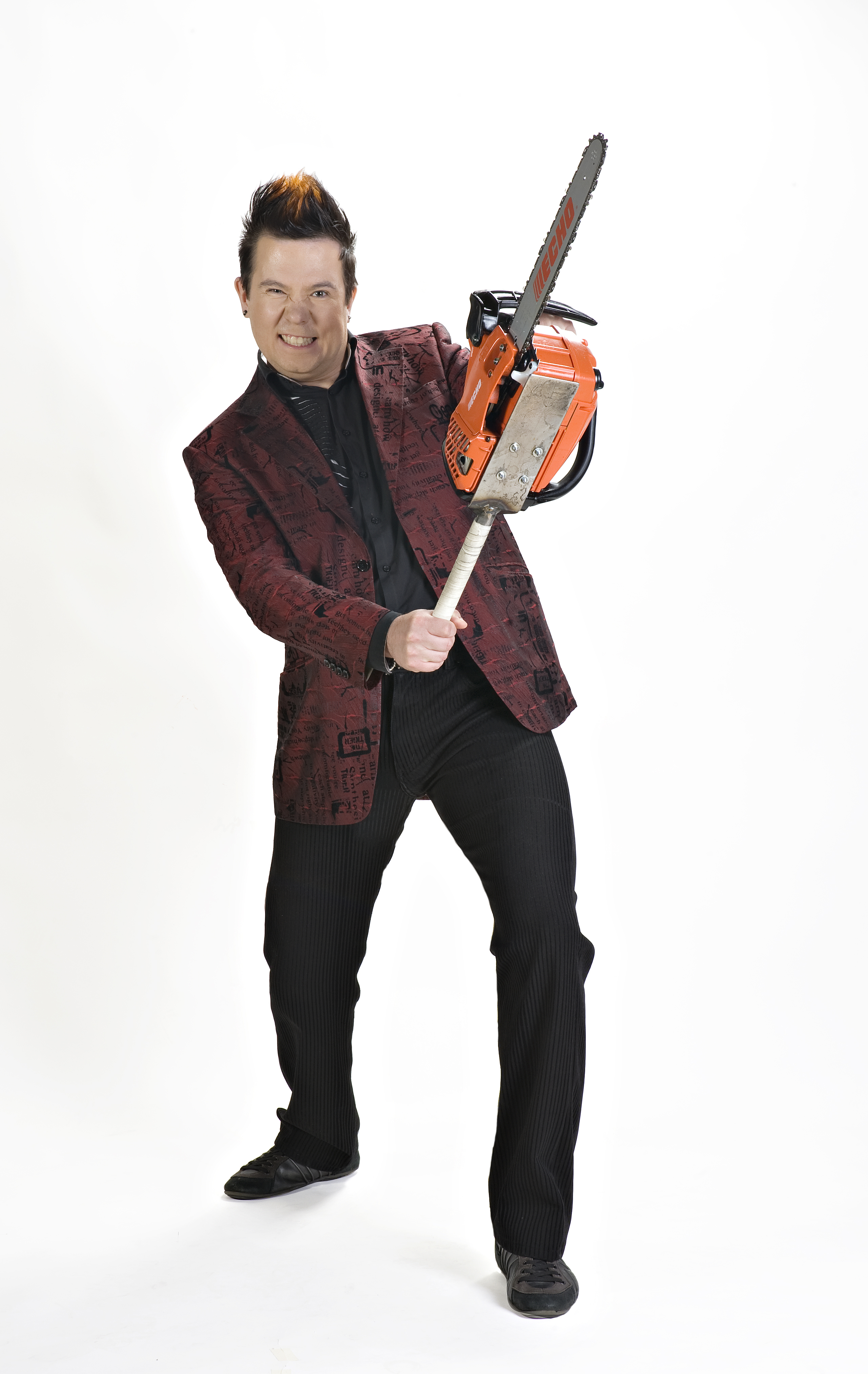 Janne Mustonen moottorisahataituri